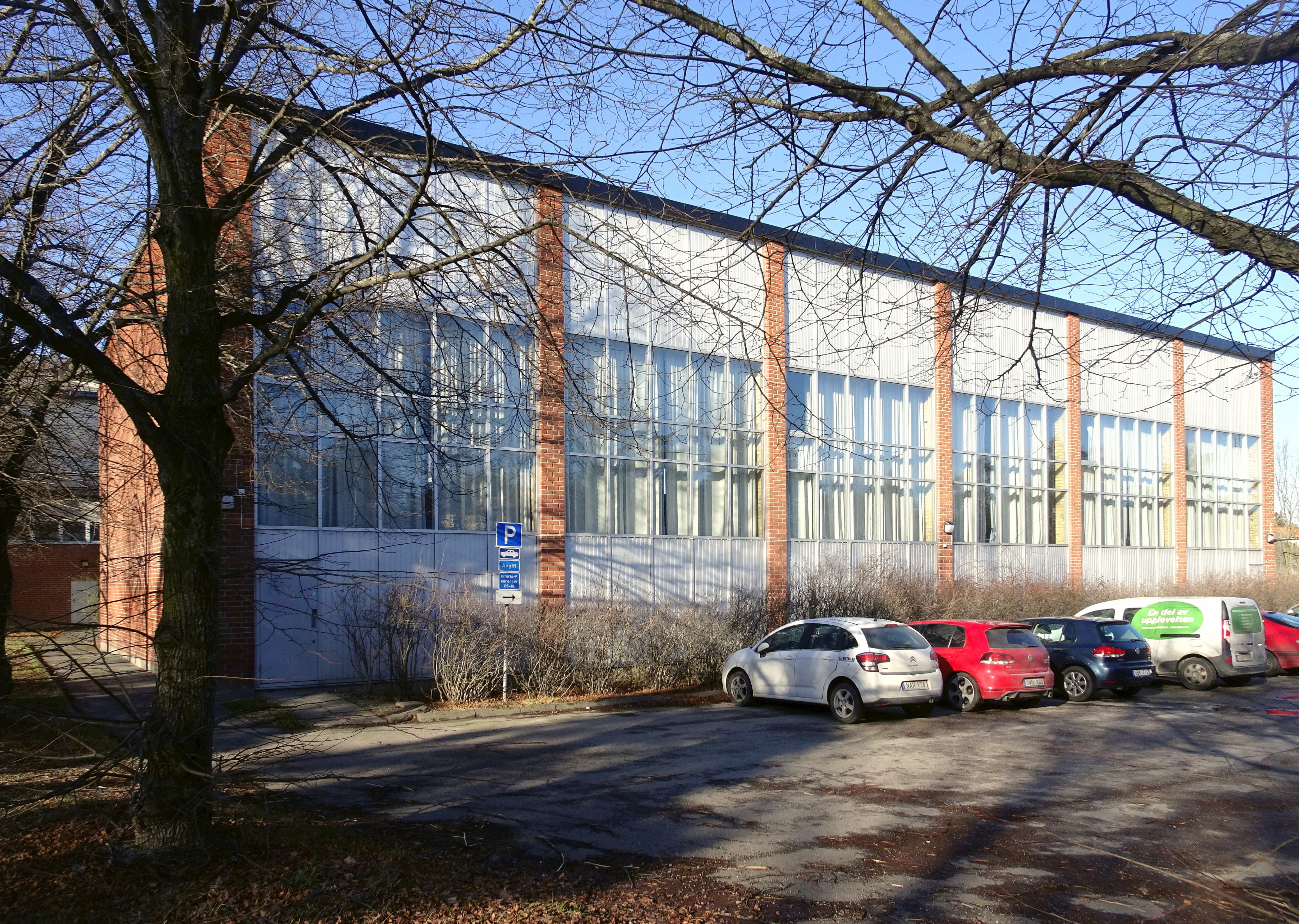 Bandhagshallen: AB Jacobson & Widmark (Konstruktör). Byggnads AB Lennart Hultenberger (Byggmästare). Lennart Brundin (Arkitekt). Stockholms Skoldirektion (Byggherre). Nybyggnadsår 1962 - 1968